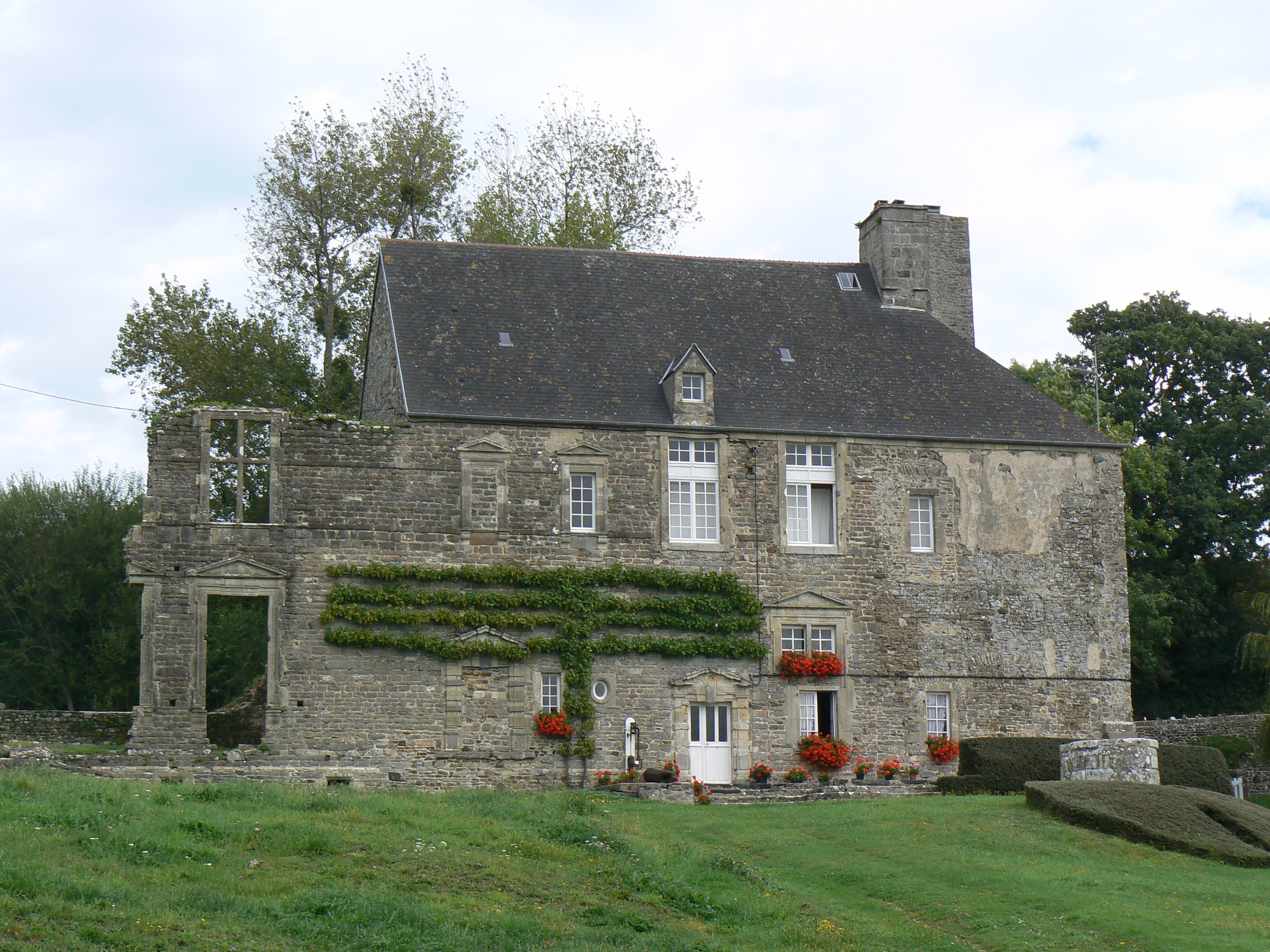 Manoir de Graffard à Barneville-Carteret (50)